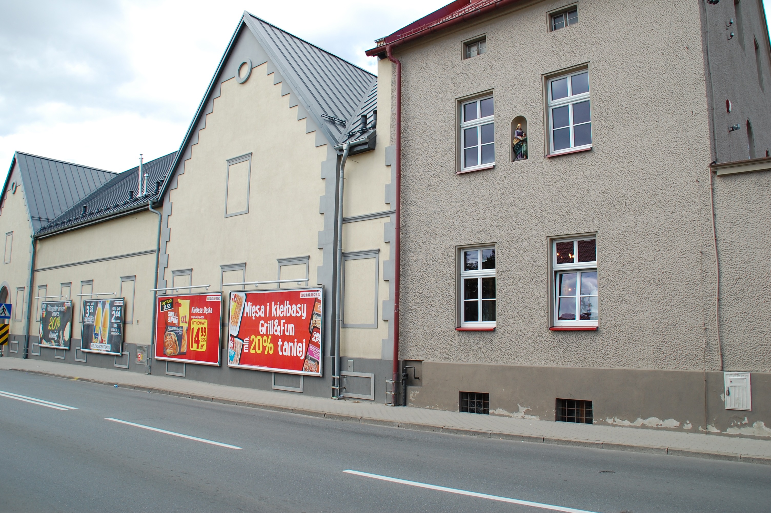 Krankenhauskapelle Olesno außen